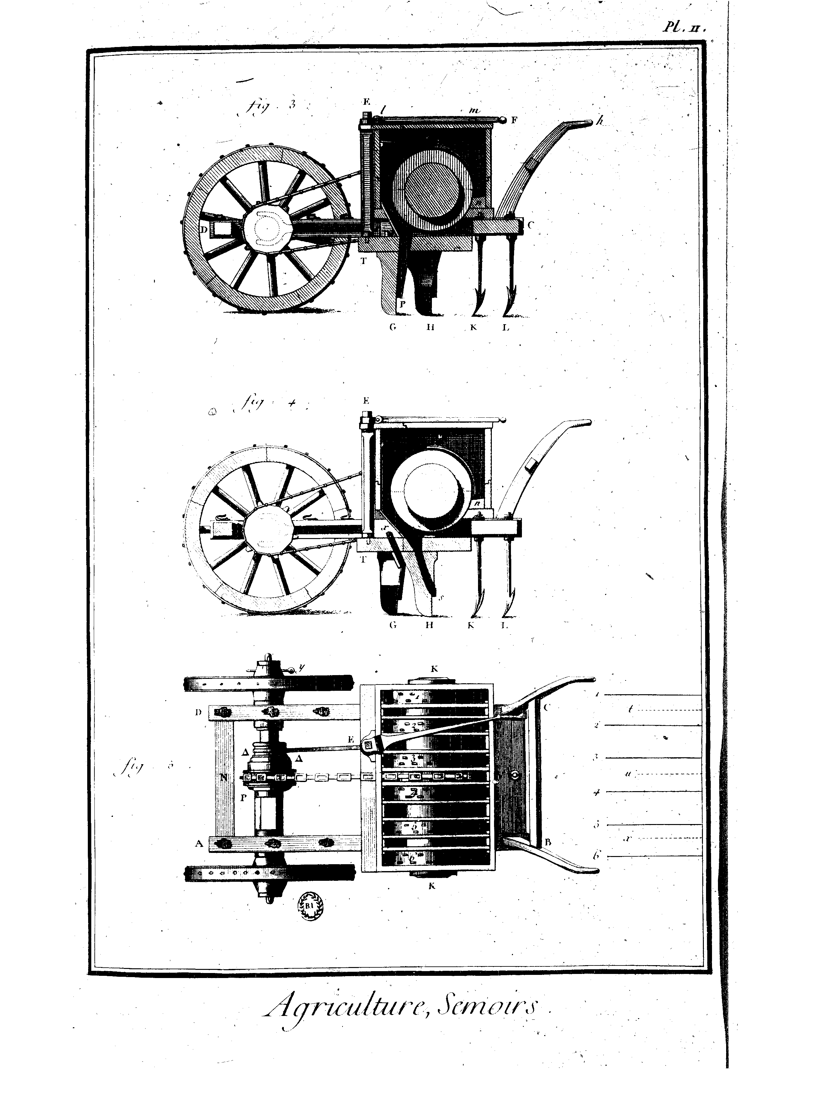 Planches de l'Encyclopédie de Diderot et d'Alembert, volume 1.